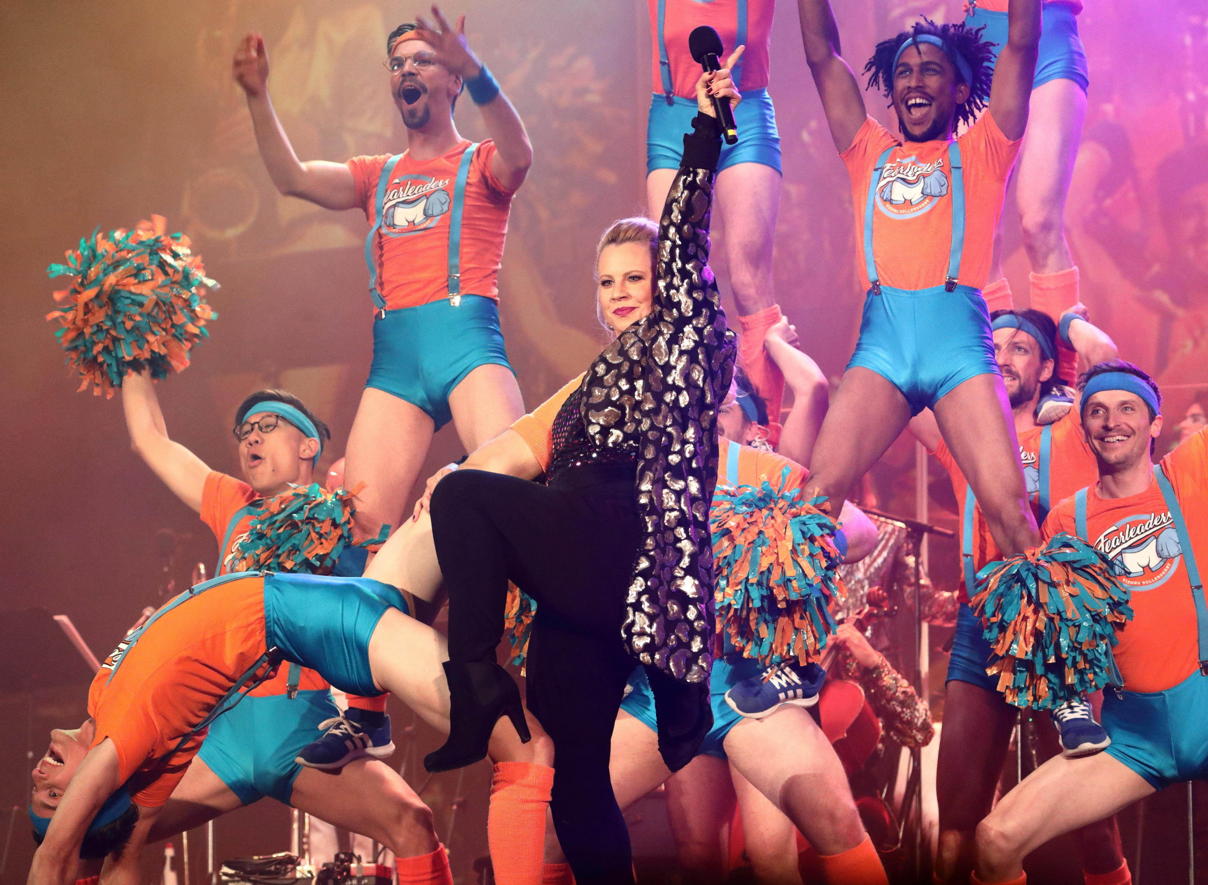 Die österreichische Schauspielerin Katharina Straßer als Sängerin und Moderatorin mit den Fearleaders bei der Eröffnung der Wiener Festwochen 2019 am Rathausplatz.